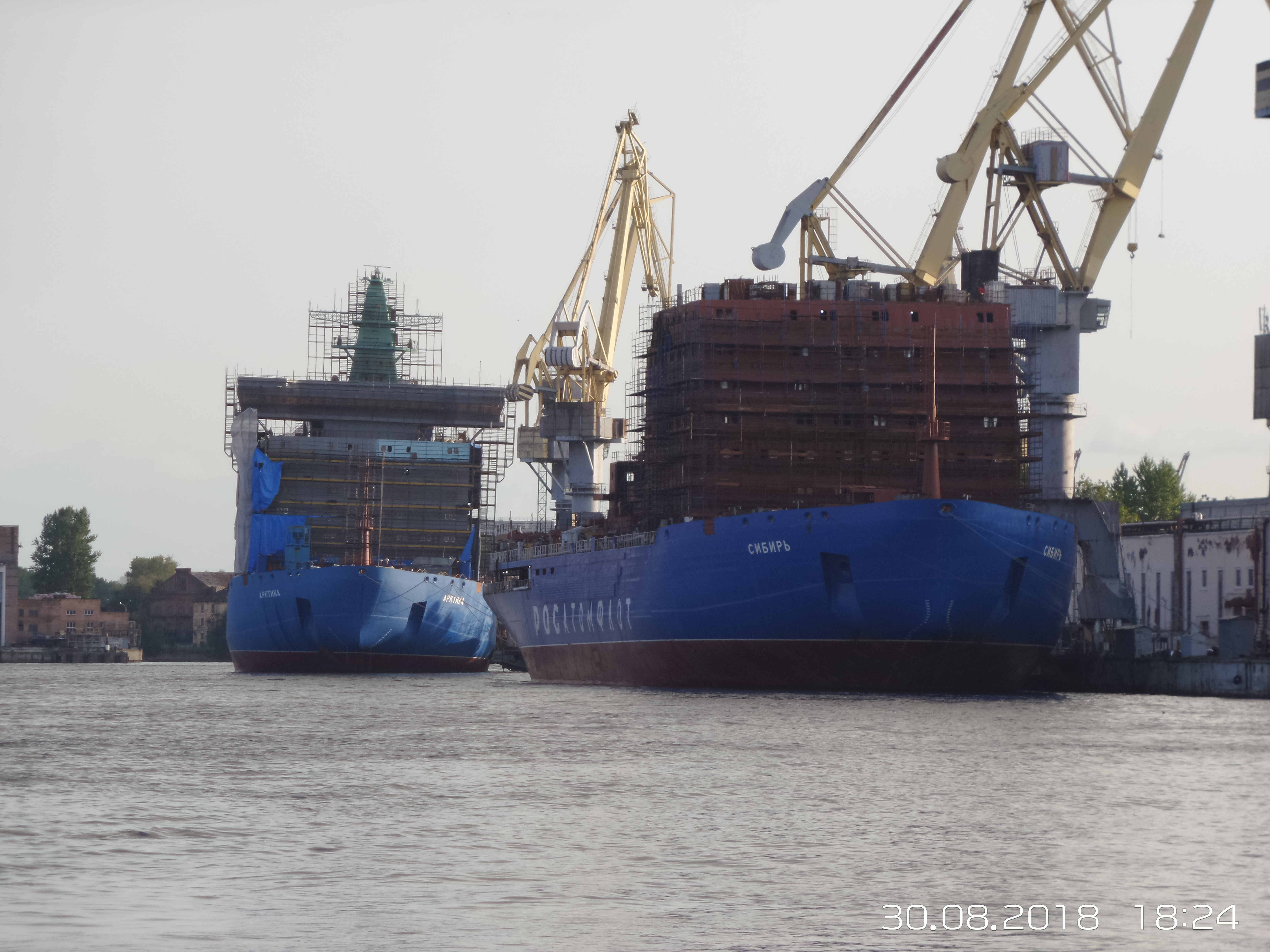 Атомные Ледоколы "Арктика" и "Сибирь"проекта 22220